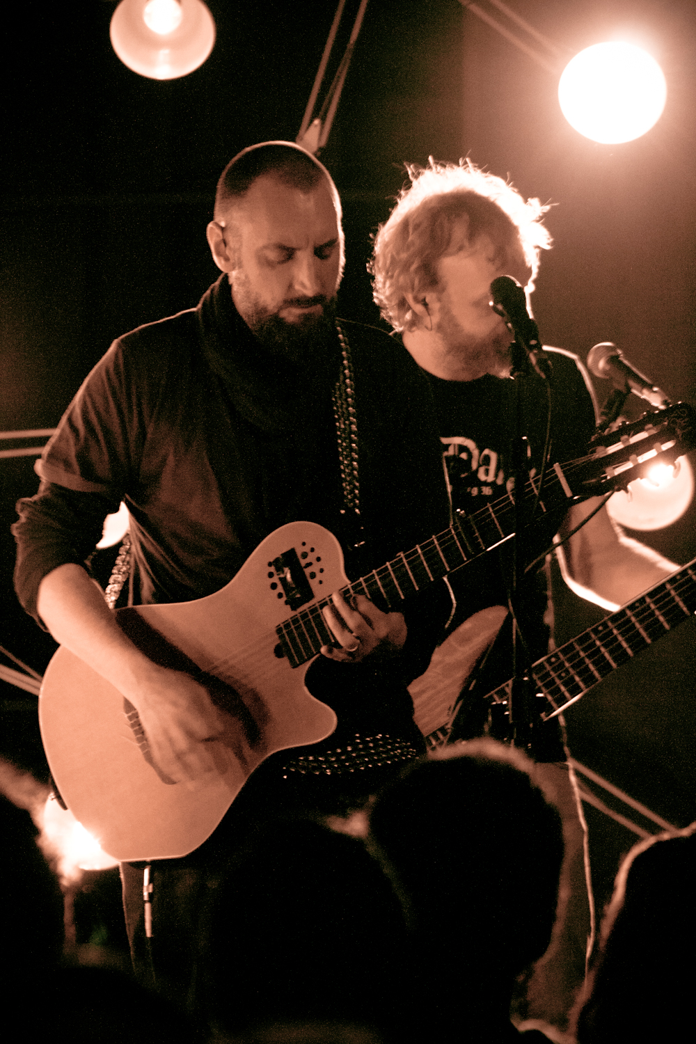 Fink en concert le 11 juillet 2011